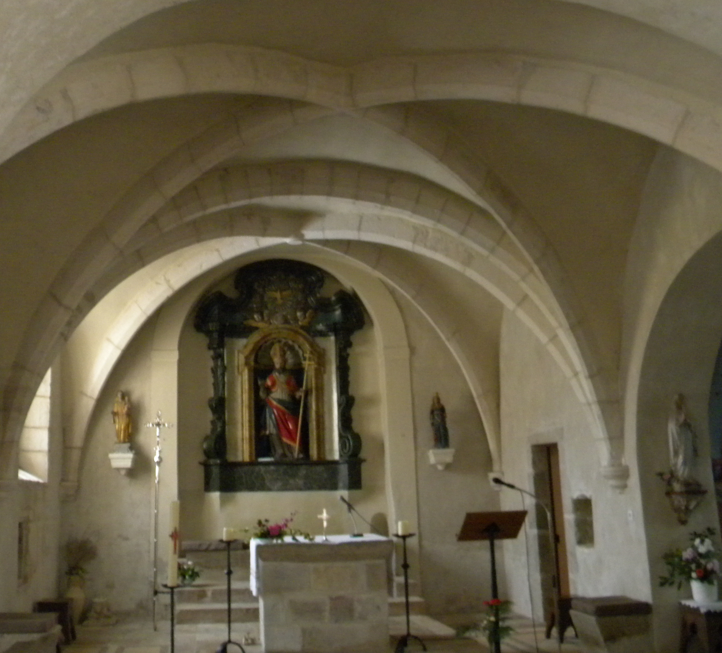 Sankta Isidoro Montagny-lès-Beaune